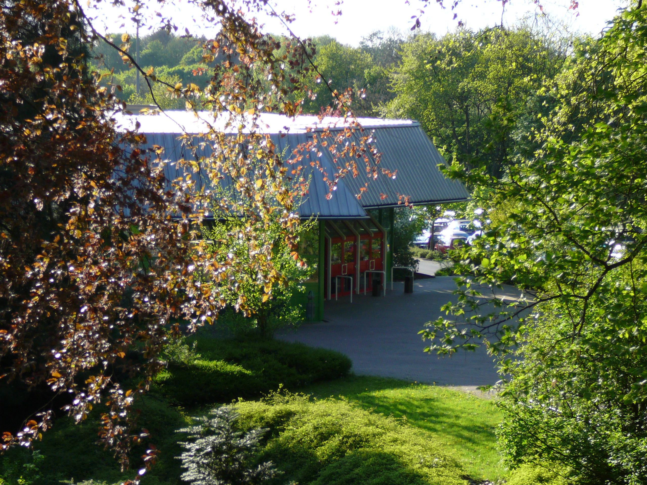 Zur Waldesruh, Wuppertal